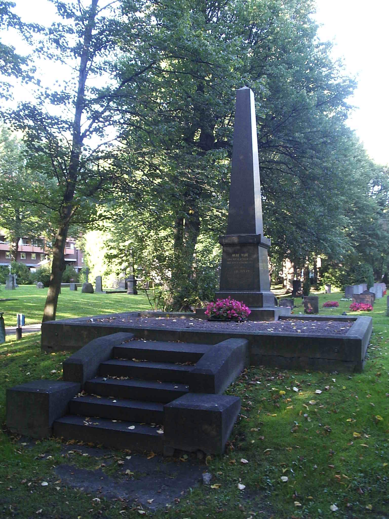 Bilden är fotograferad av Harri Blomberg. Gravplats för Olof Wijk d.ä. (9 okt 1786 - 4 febr 1856) och dennes hustru Hilda Virginia Prytz (11 aug 1810 - 27 juni 1890), de gifte sig 1832. Photo by Harri Blomberg.